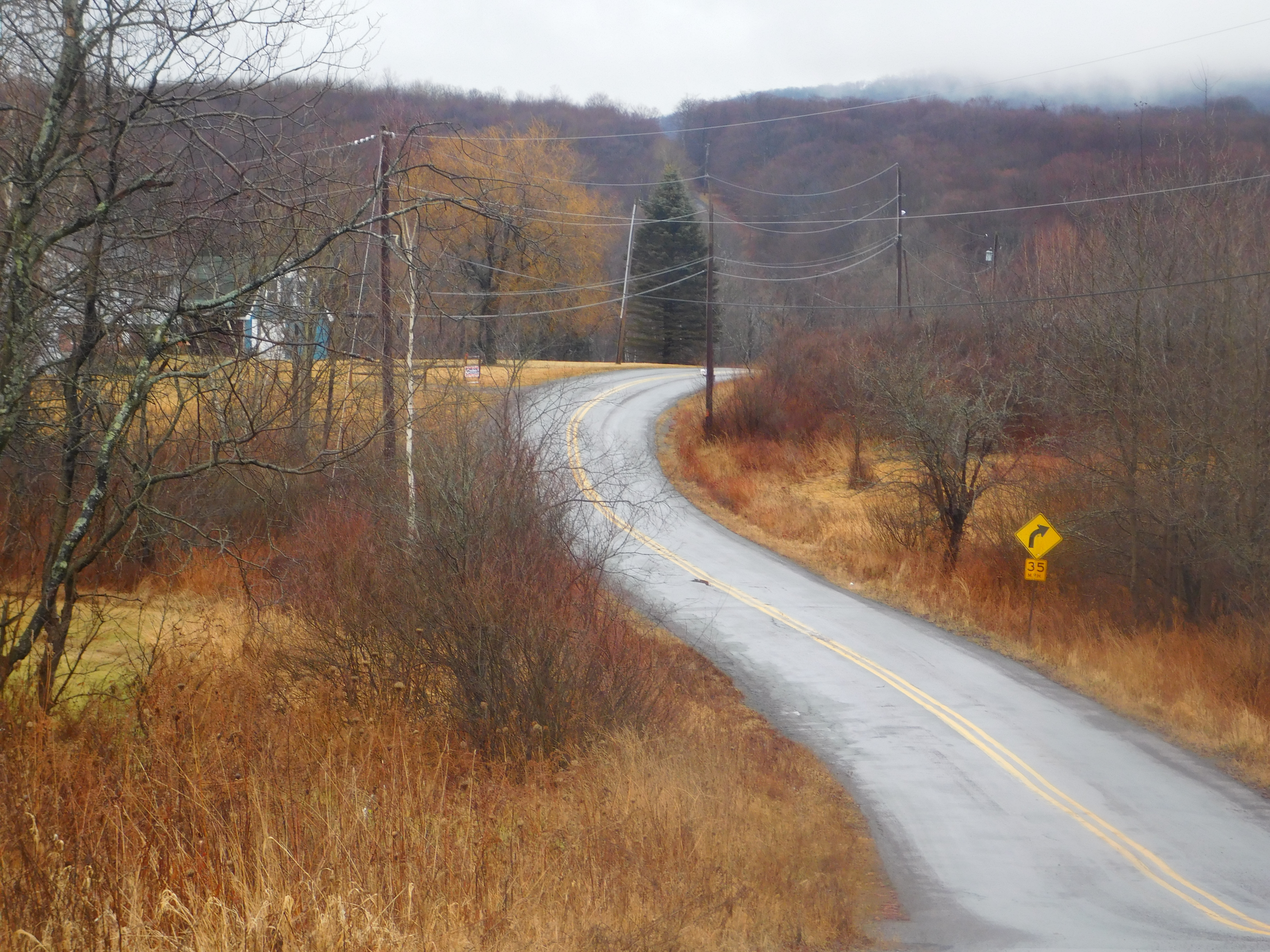 Burnwood, Pennsylvania